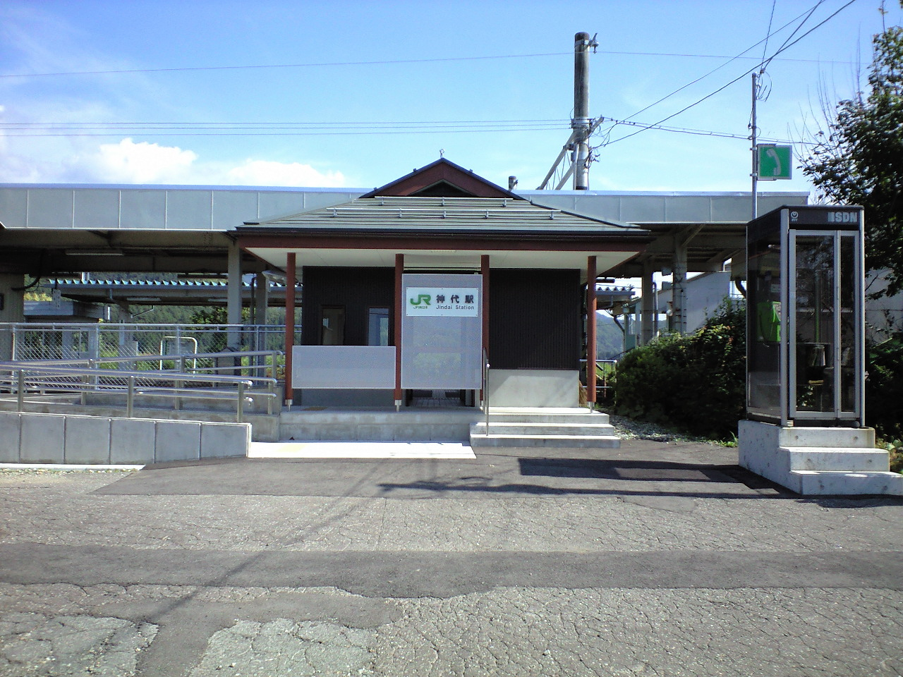 Jindai Station, on the Tazawako Line, Semboku, Akita, Japan